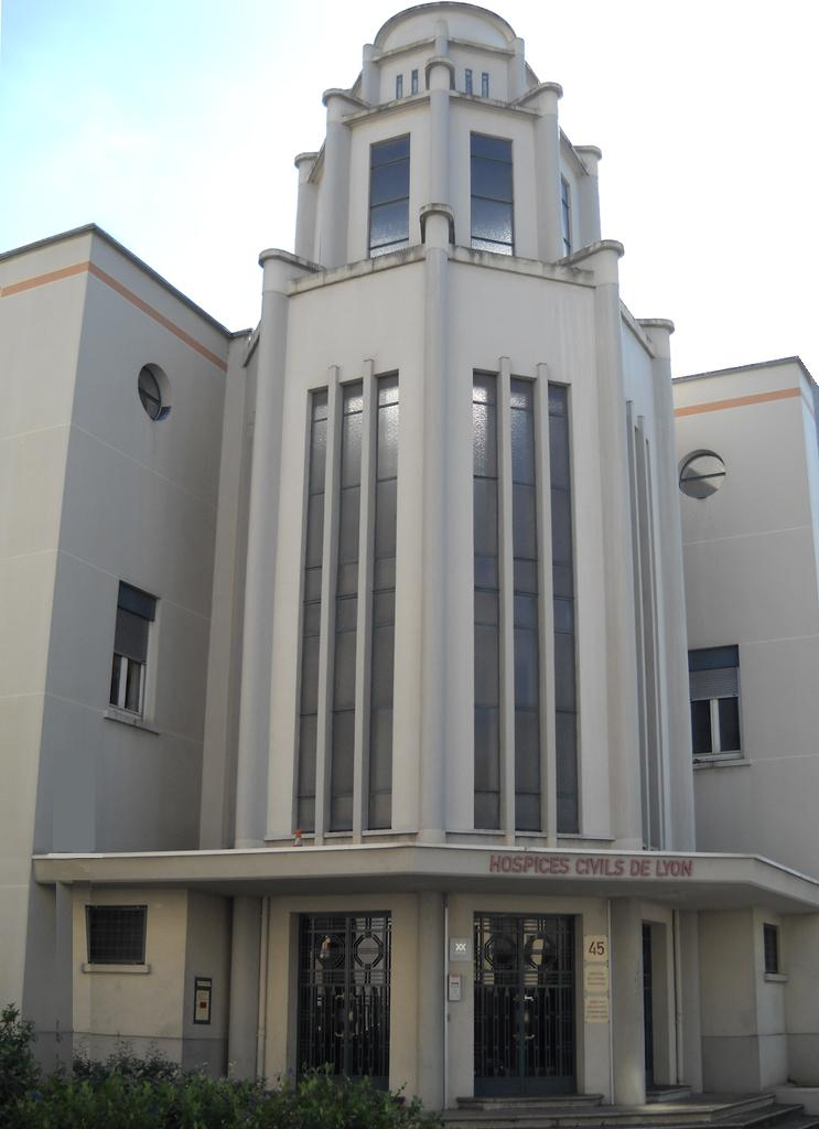 Entrée principale des Laboratoires Lumière, 45 rue Villon, à Lyon.